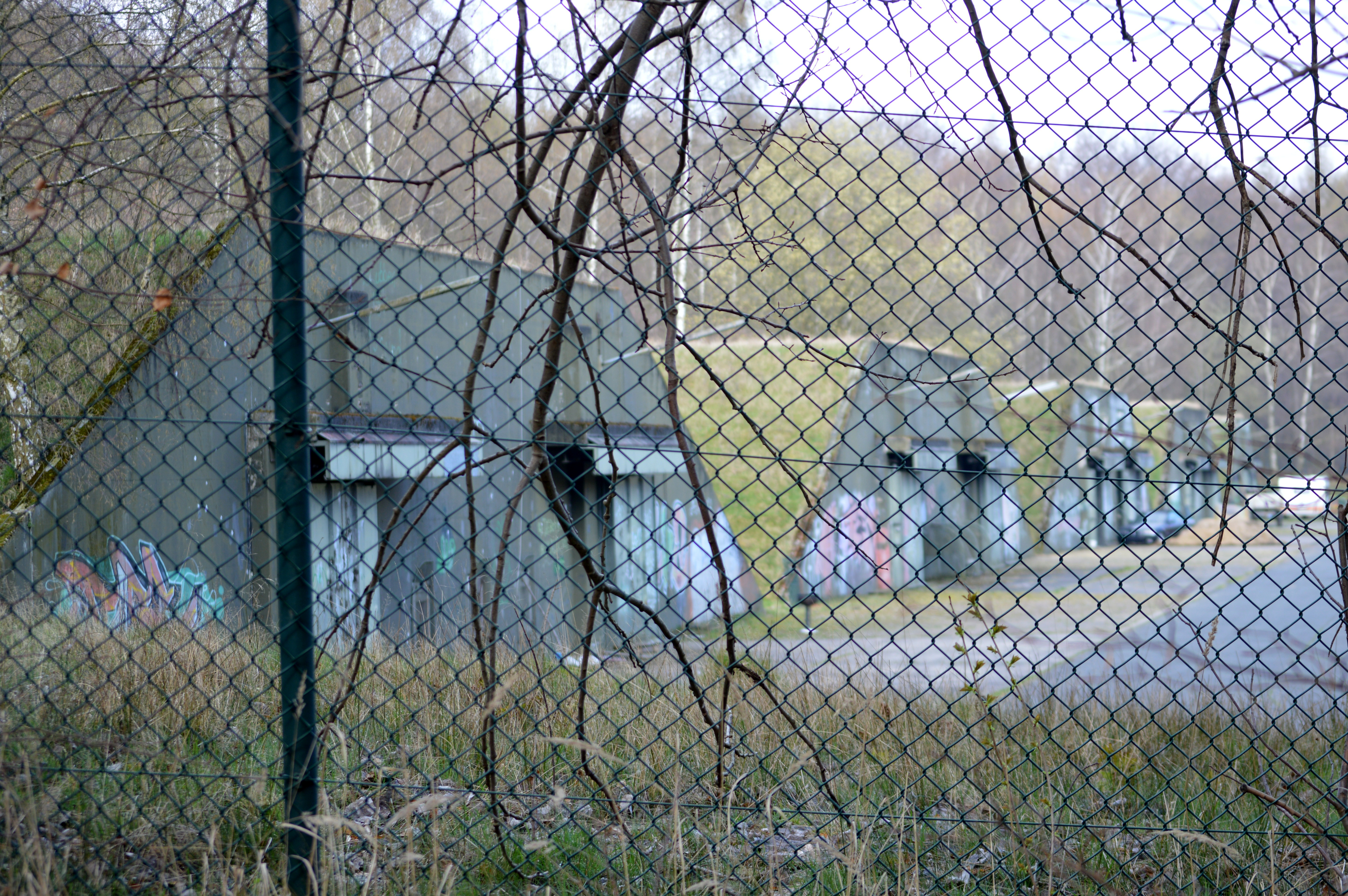 Landschaftsschutzgebiet Vorholzer Bergland - Ehemaliges Munitionslager Wöhle - Jetzt Schäferei (15)